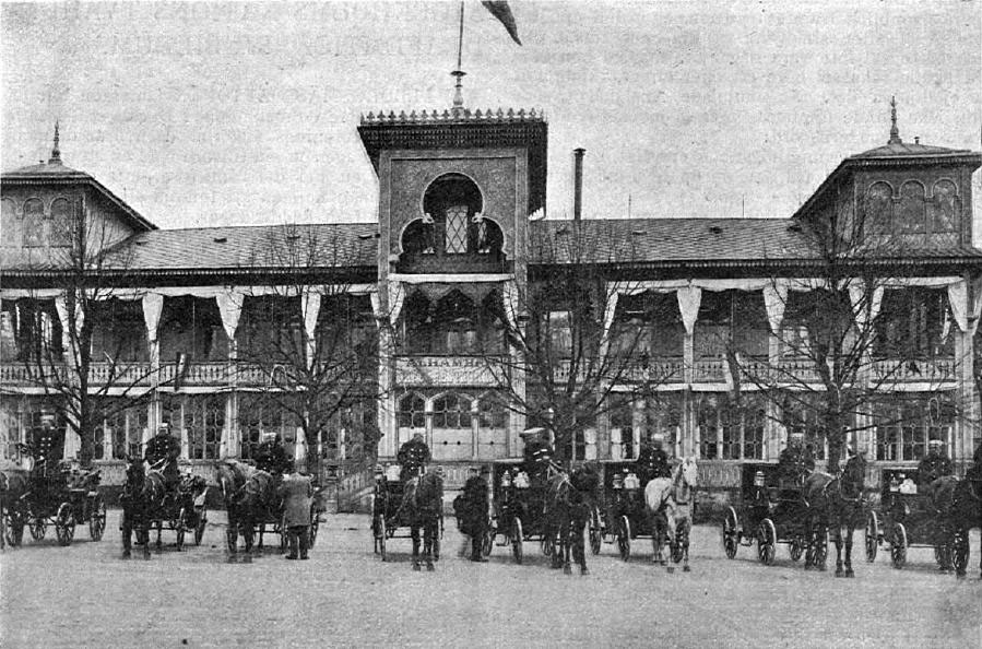 Taxameterdroskor framför Alhambra, Djurgården 1899